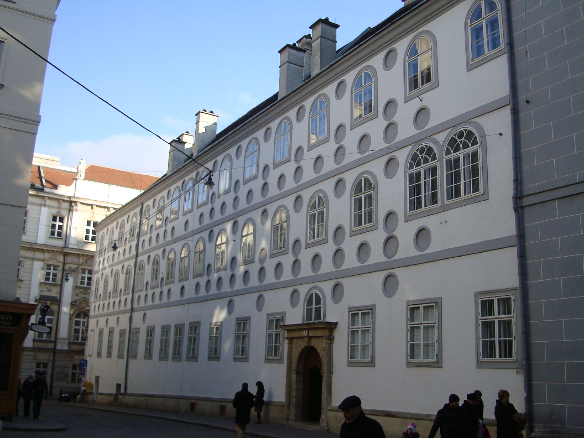 Franziskanerkloster Wien